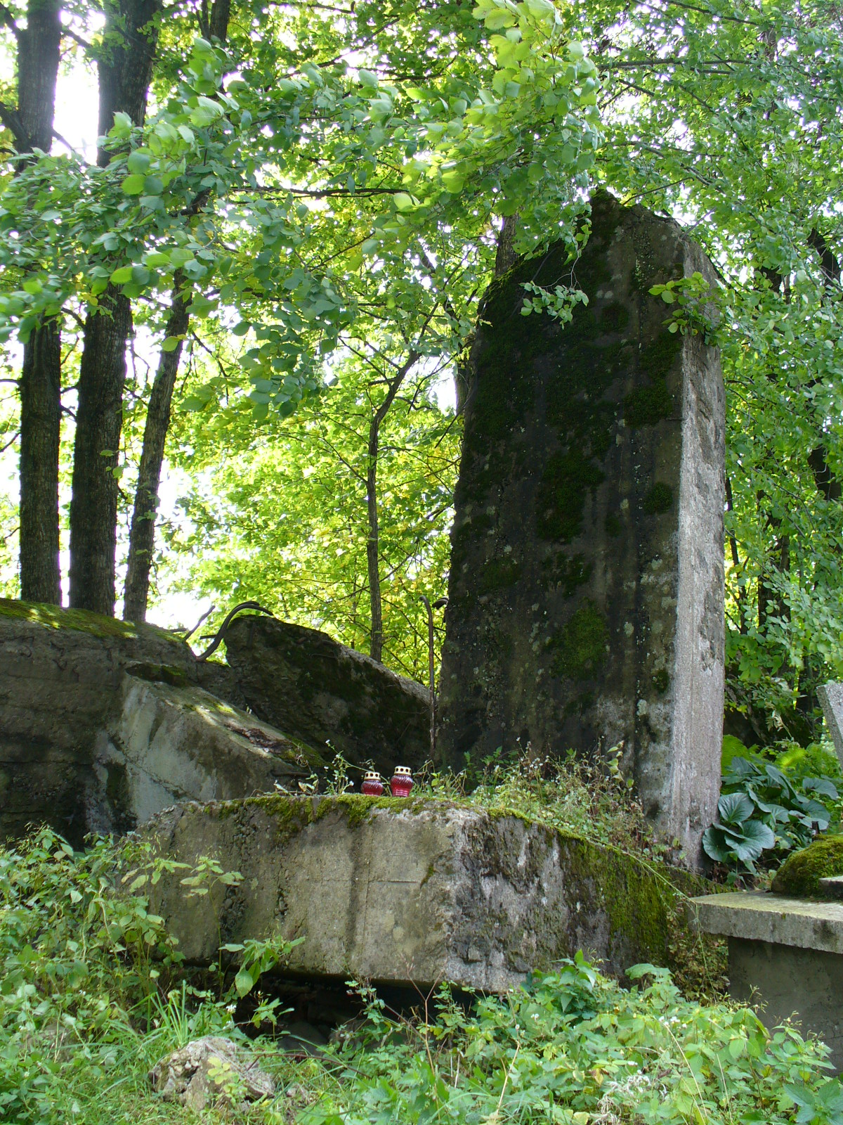 Wg zgłaszającego: Ruiny umocnień Linii Mołotowa na cmentarzu w Lesku. Wg [1] to ruiny cerkwi